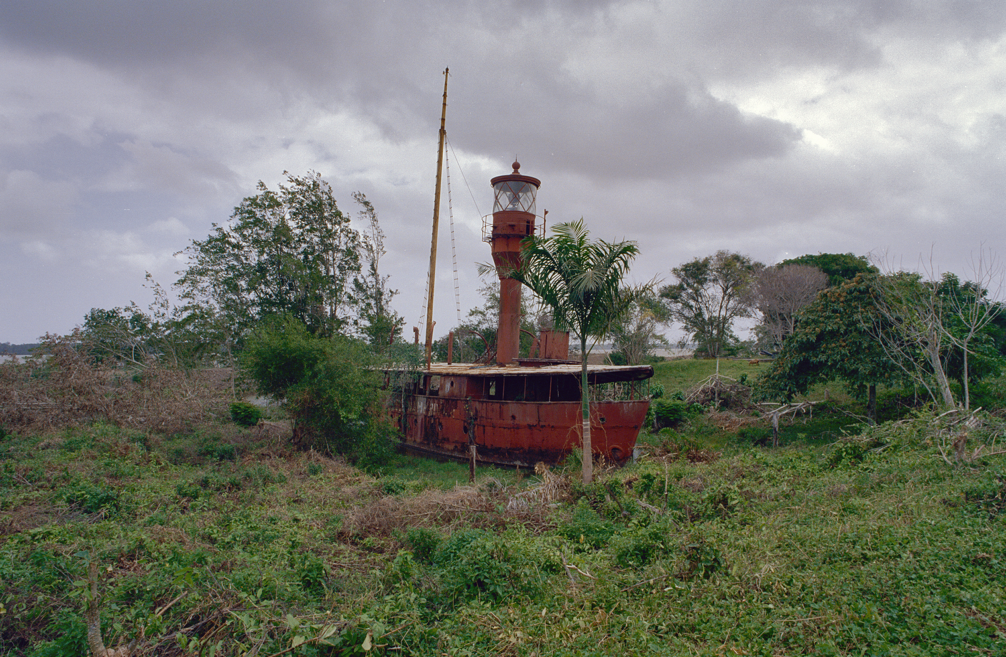 Lichtschip Suriname-Rivier: Lichtschip met vuurtoren van voren gefotografeerd (opmerking: Suriname reis Loek Tangel)